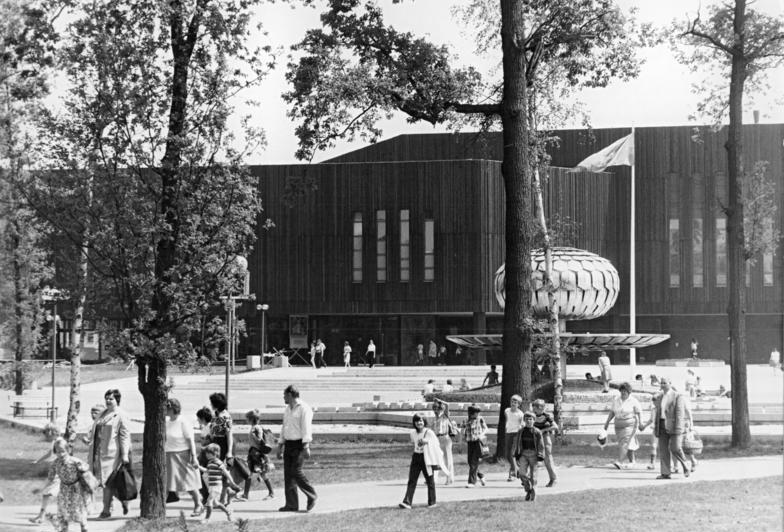 Berlin, Wuhlheide, "Pionierpalast Ernst Thälmann", Springbrunnen ADN-ZB Richter 14.5.81 Berlin- Der Pionierpalast "Ernst Thälmann" in der Wuhlheide hat sich seit der Übergabe im Oktober 1979 zu einem beliebten Freizeitzentrum für Schüler aller Altersgruppen entwickelt. Bei wöchentlich rund 180 Veranstaltungen finden die Jungen und Mädchen Freude, Entspannung und Unterhaltung